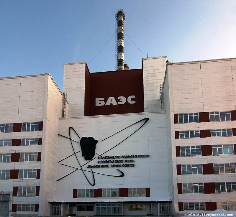 Reaktorgebäude des Kernkraftwerks Kernkraftwerk Belojarsk.